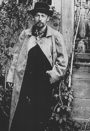 Anton Cechov